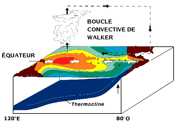 Circulation directe de Walker: Les eaux chaudes de l'Ouest du Pacifique crée une zone de convergence convective L'air chaud s'élève et se dirige vers les zones plus froides de l'Est du pacifique Subsidence de l'air près de la côte de l'Amerique du Sud Circulation d'Est de retour en surface qui hausse le niveau de la mer devant elle.